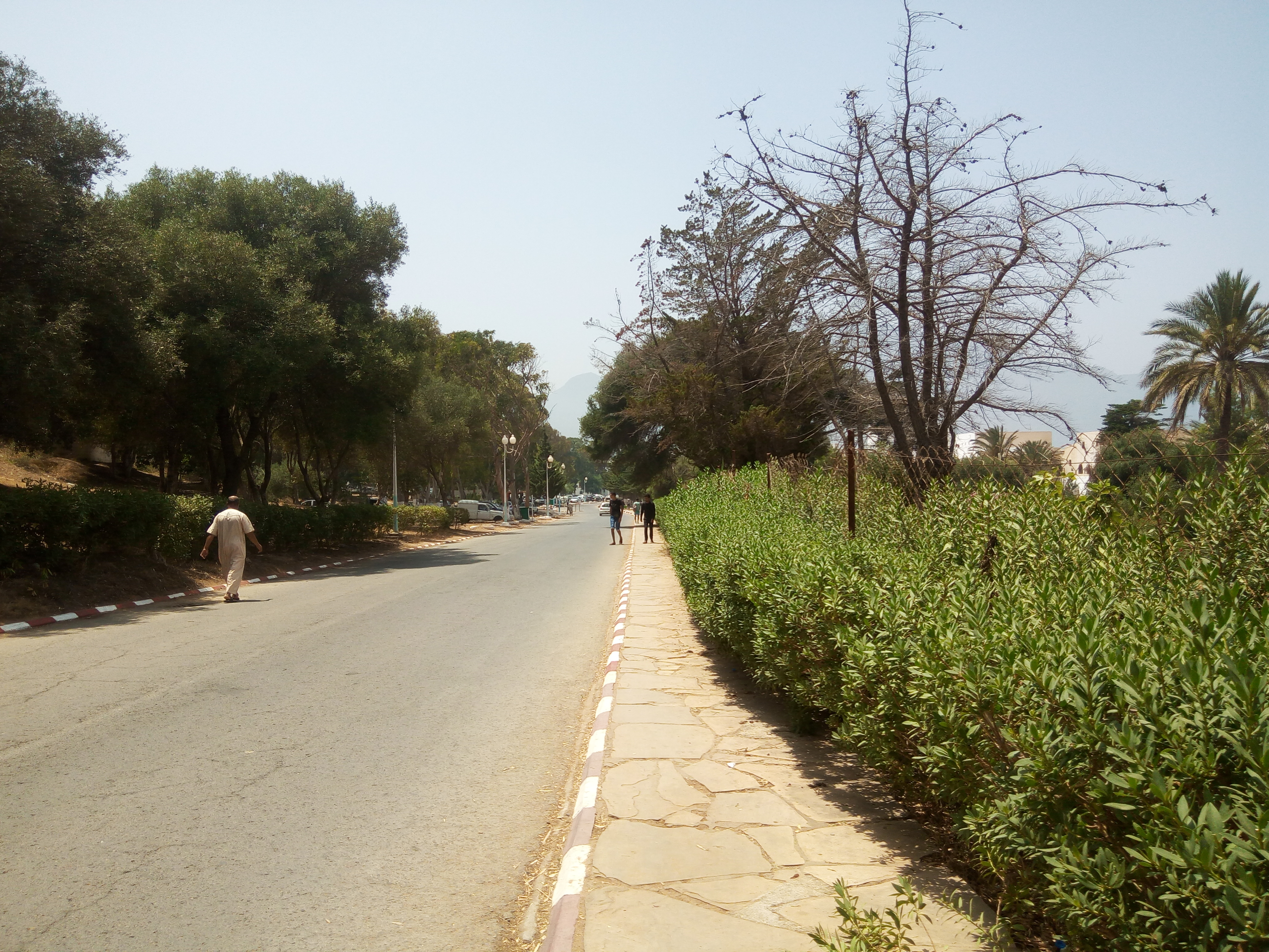 Complexe Touristique de Matarès Tipaza